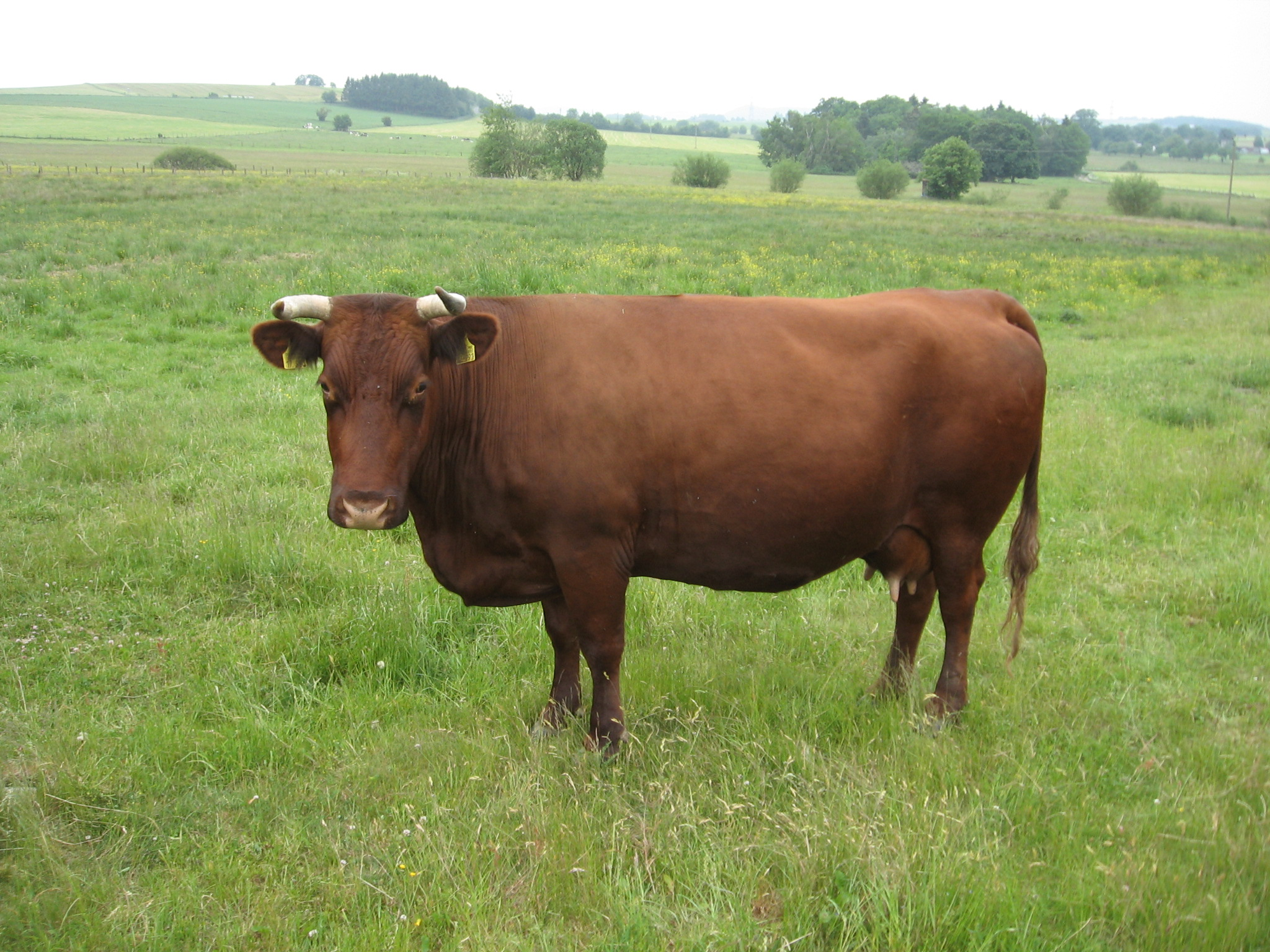 Weibliches Rotes Höhenvieh vom "Verein für Natur- und Vogelschutz im Hochsauerlandkreis" im NSG Hemmeker Bruch bei Brilon-Madfeld. Name der Kuh ist Fanny.